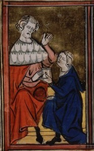 Baudouin Ier et un messager